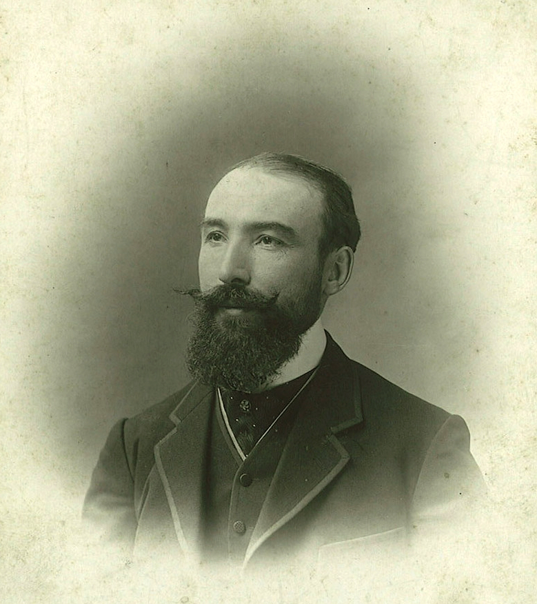 Robert de Montessus de Ballore, photo en 1914, photographe inconnu.